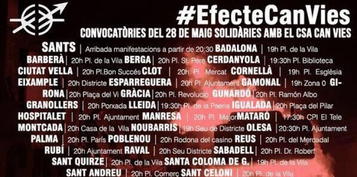 Les concentracions de suport al CSA Can Vies van anar-se'n estenent per múltiples poblacions